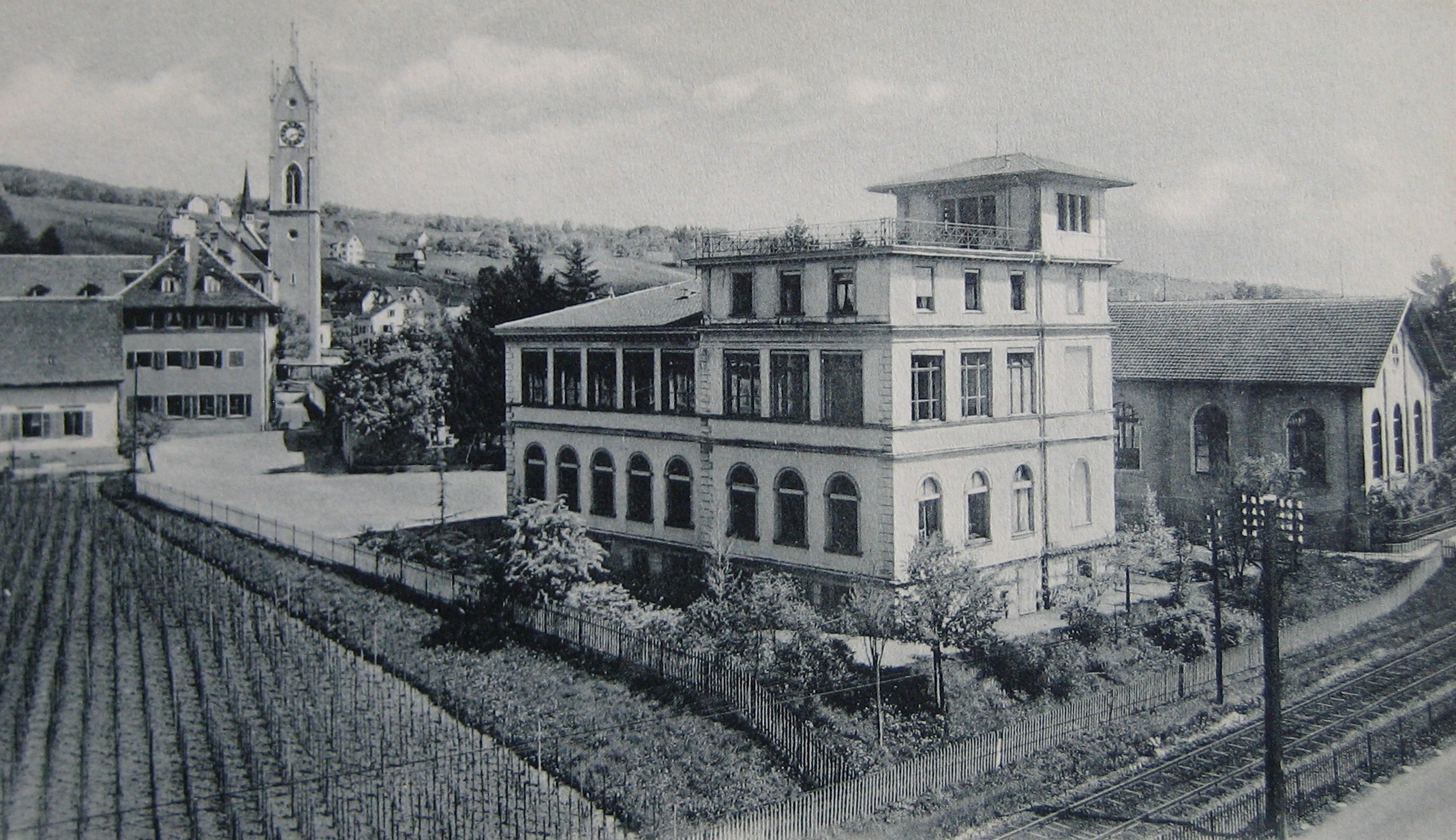 Italienische Villa im Seminar Küsnacht, um 1900